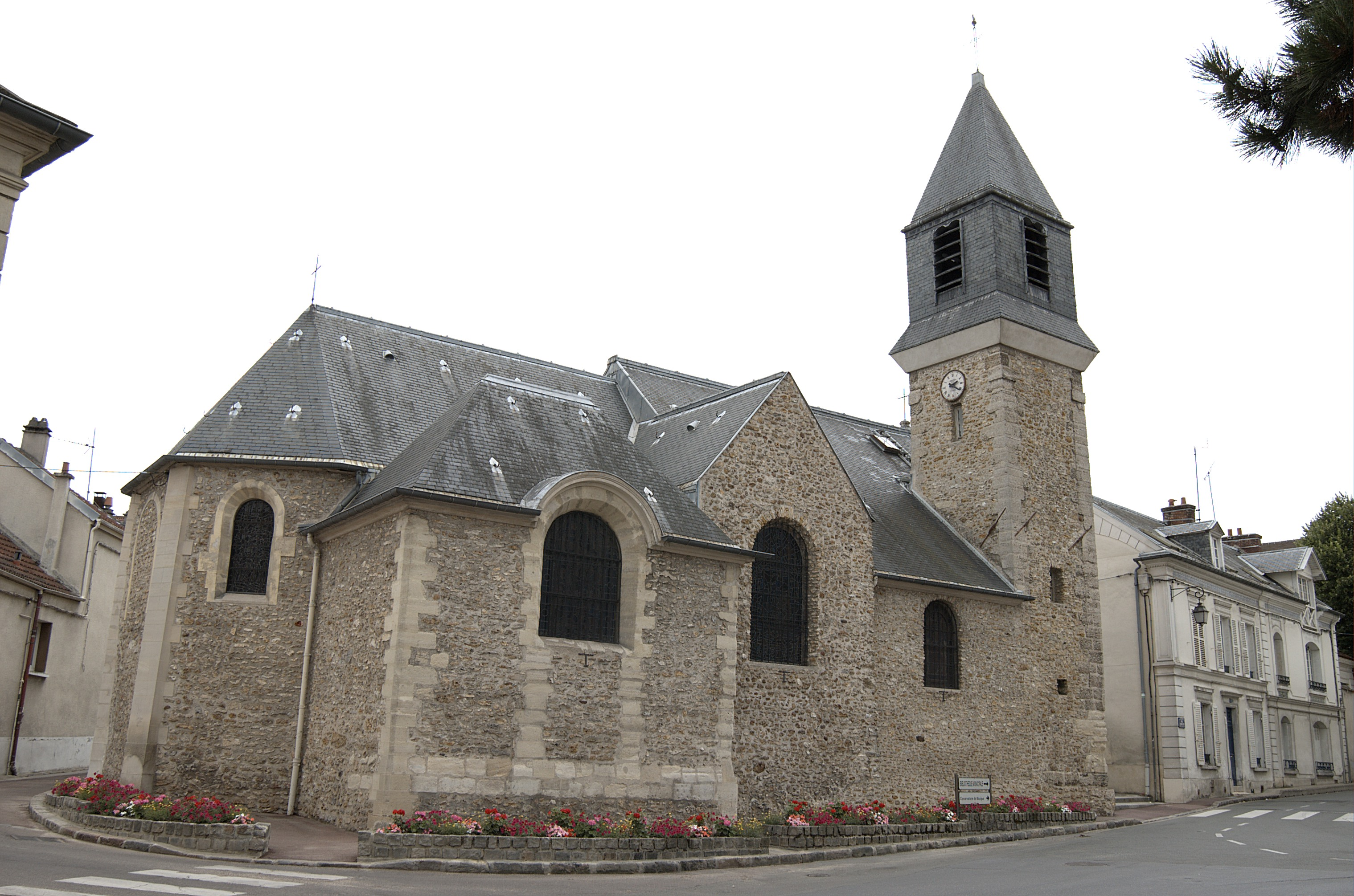 L'église Saint-Eustache dans le vieux village de Viroflay